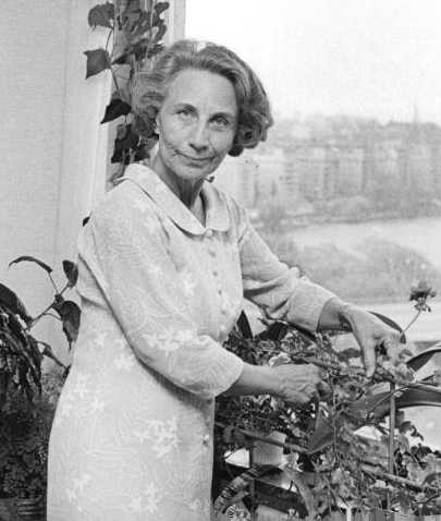 Mrs. Aina Erlander